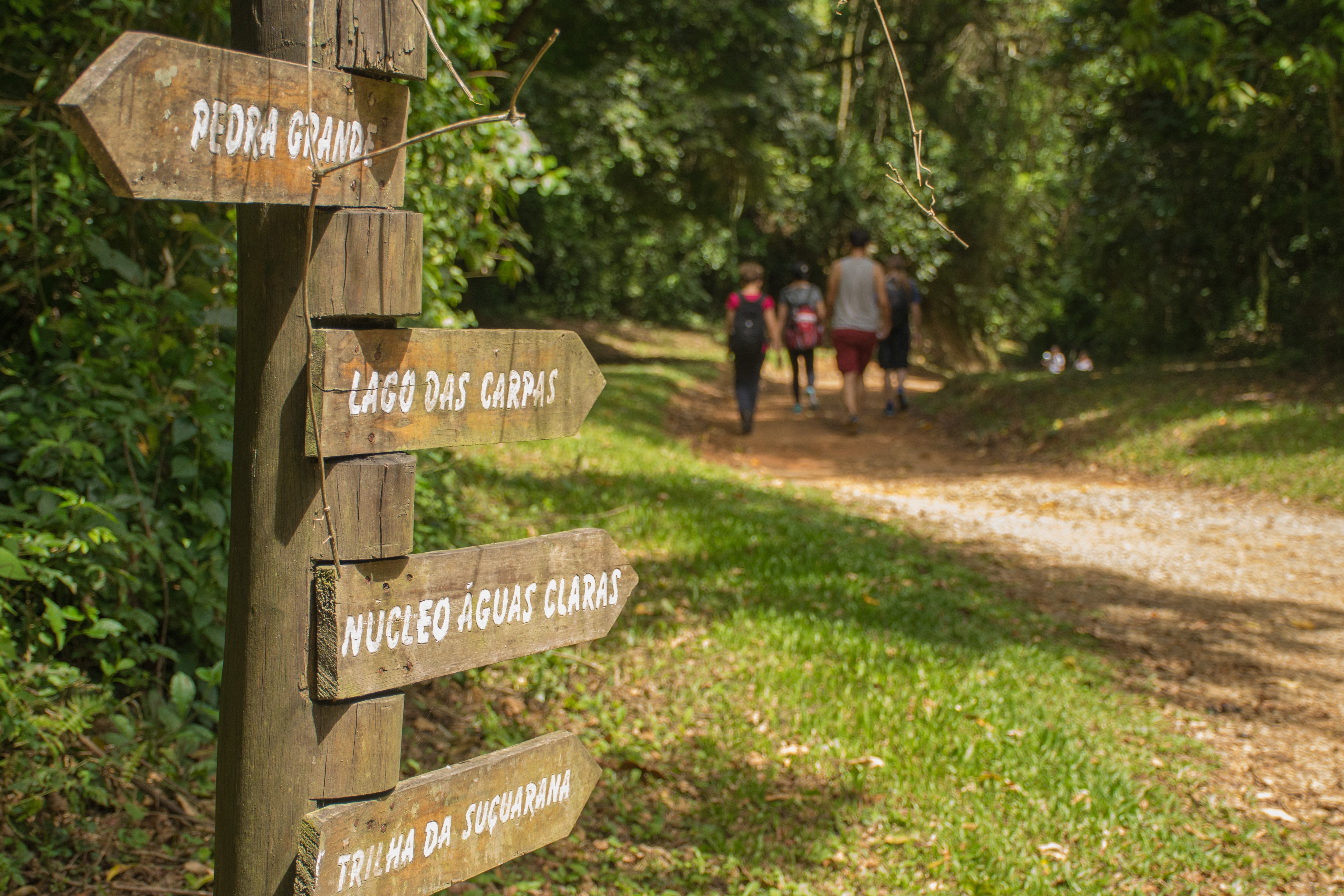 Indicações para as trilhas dentro do parque estadual da cantareira